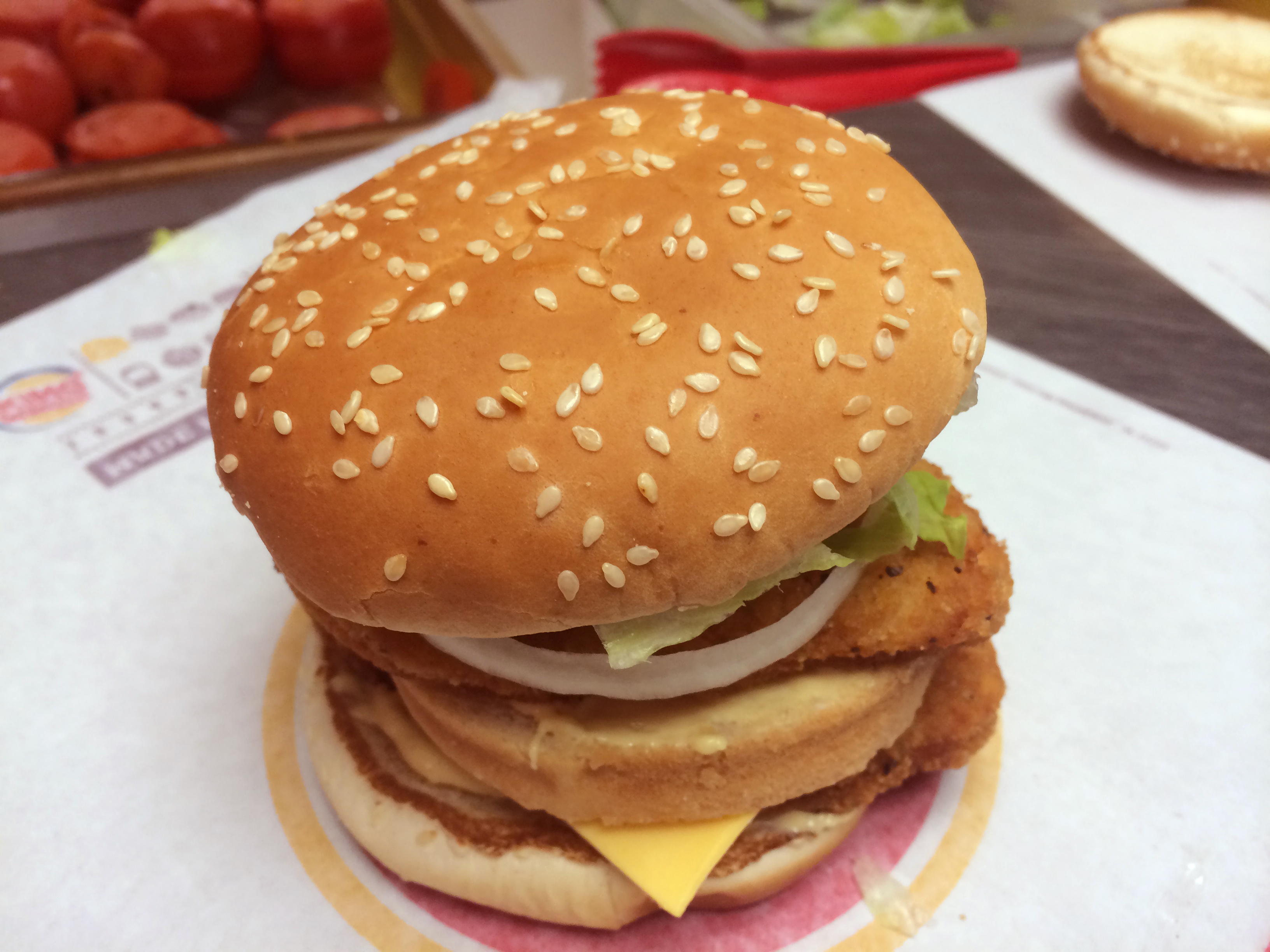 A chicken BK Big King sandwich.